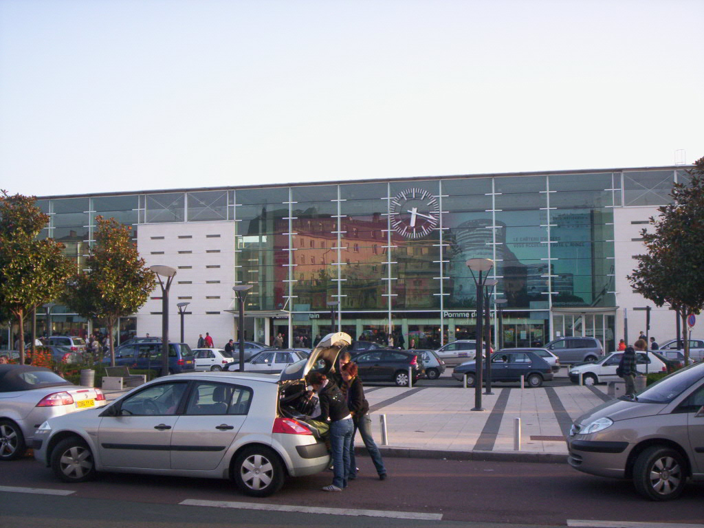 Nouvelle gare Saint-Laud d'Angers